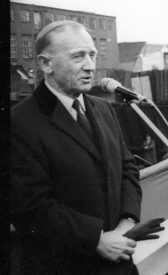 Stapellauf bei Howaldtswerke. Im Bild der Reeder Jörgen Jahre (1.v.l.) am Mikrofon. Im Hintergrund Frau Marie Luise Westphal, die Ehefrau von Werftdirektor Adolf Westphahl (3.v.l.), die Taufpatin Prinzessin Ragnhild von Norwegen (4.v.l.), die Kinder von Prinzessin Ragnhild Ingeborg Lorentzen (6.v.l.) und Haakon Lorentzen (7.v.l.).